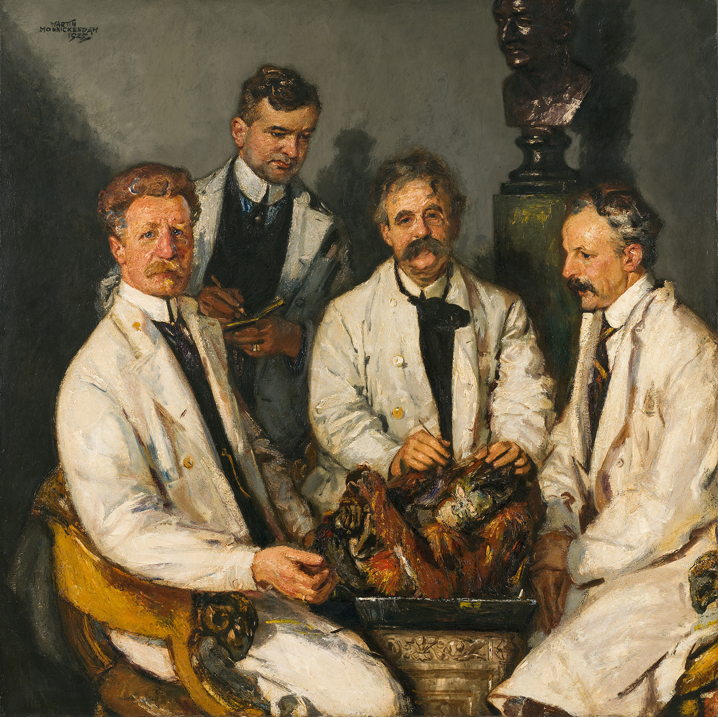 Groepsportret rondom een tafel waarop een aap, zittend Jan Boeke, Louis Bolk en Arnold van den Broek. Links staat Jan (Ton?) Barge. Op de achtergrond is een borstbeeld van Petrus Camper zichtbaar. Gesigneerd en gedateerd.